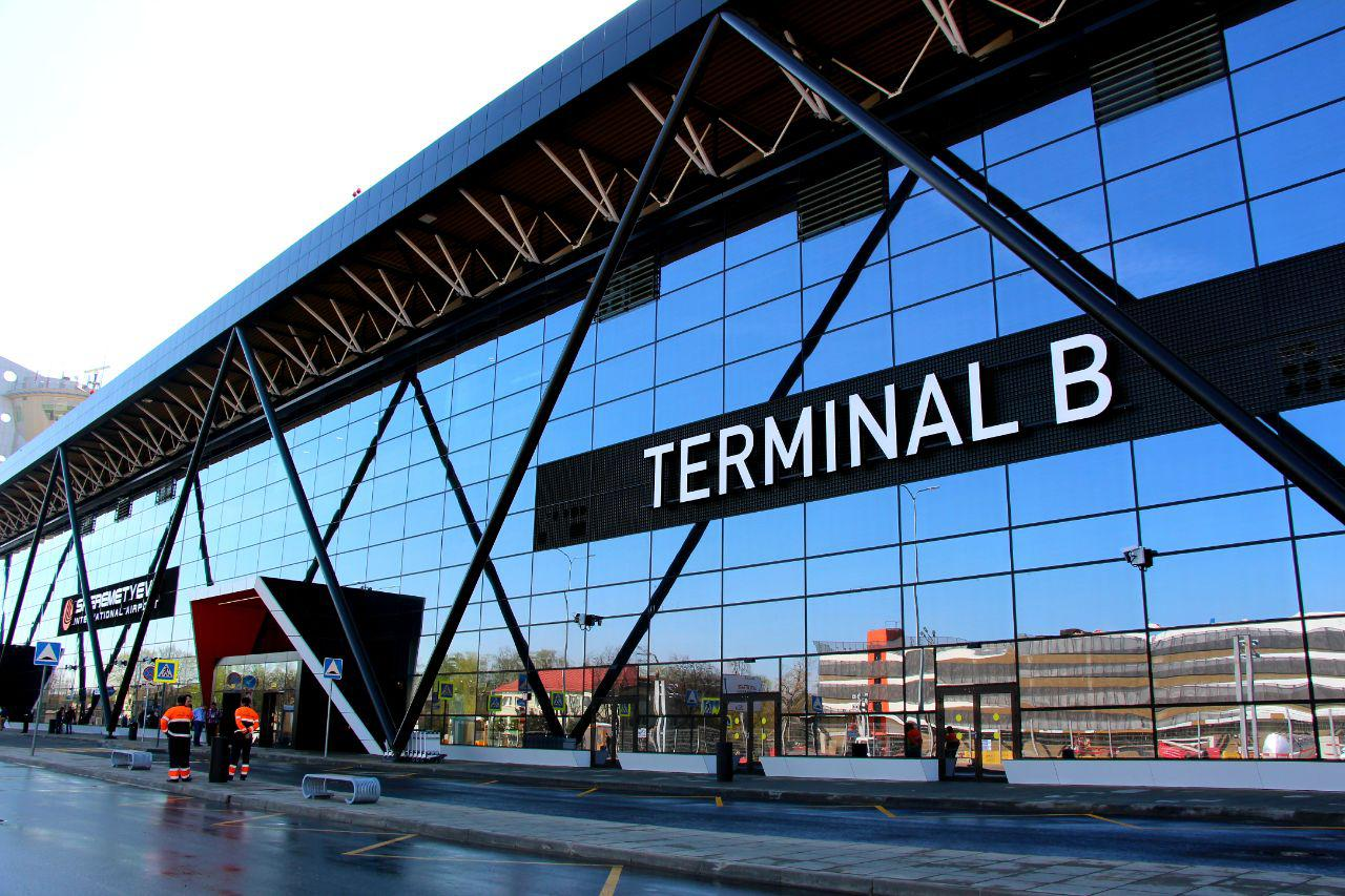 АП Шереметьево терминал В, 2018 год